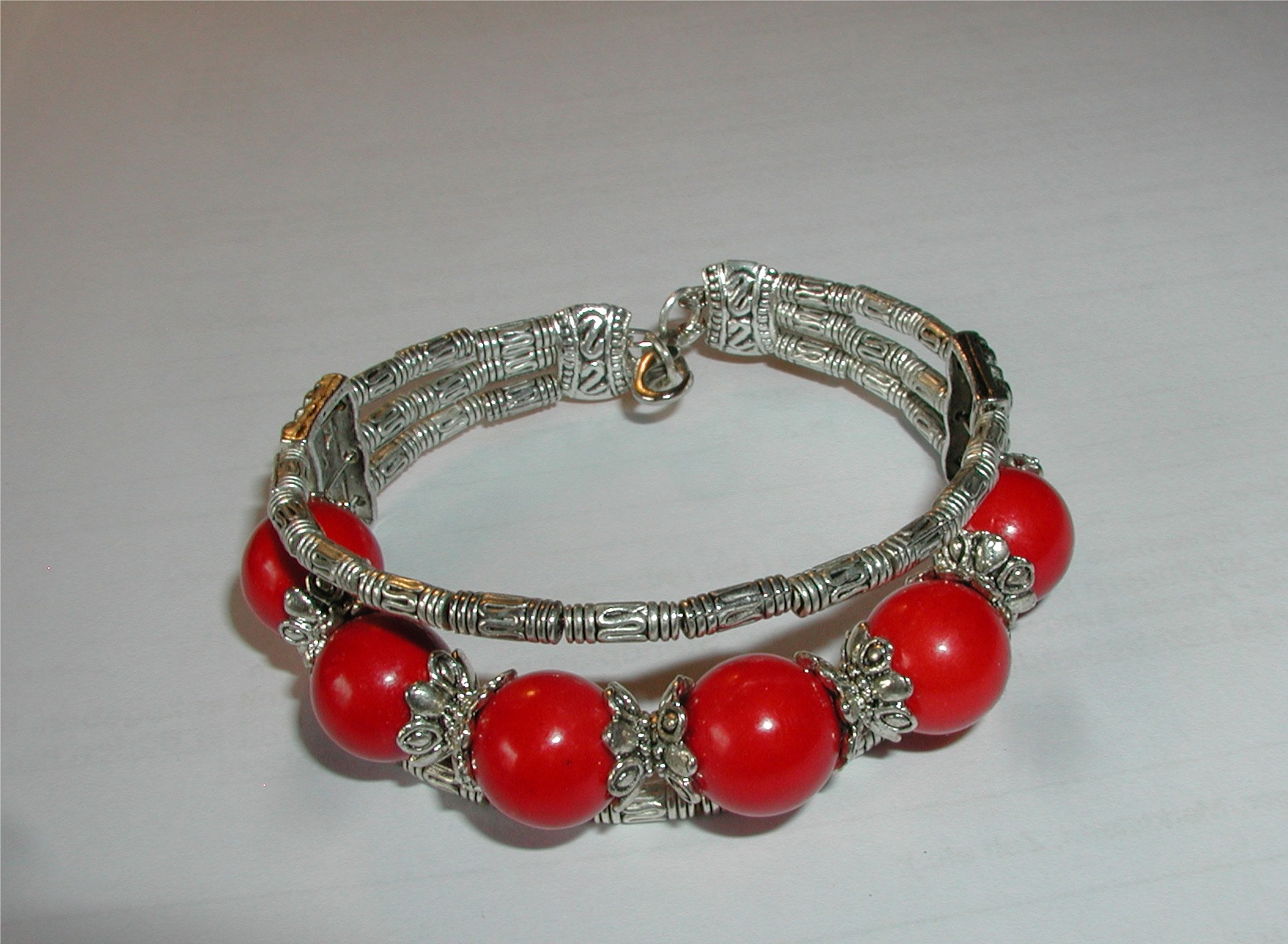 Korallen-Armband - Handarbeit aus Tibet